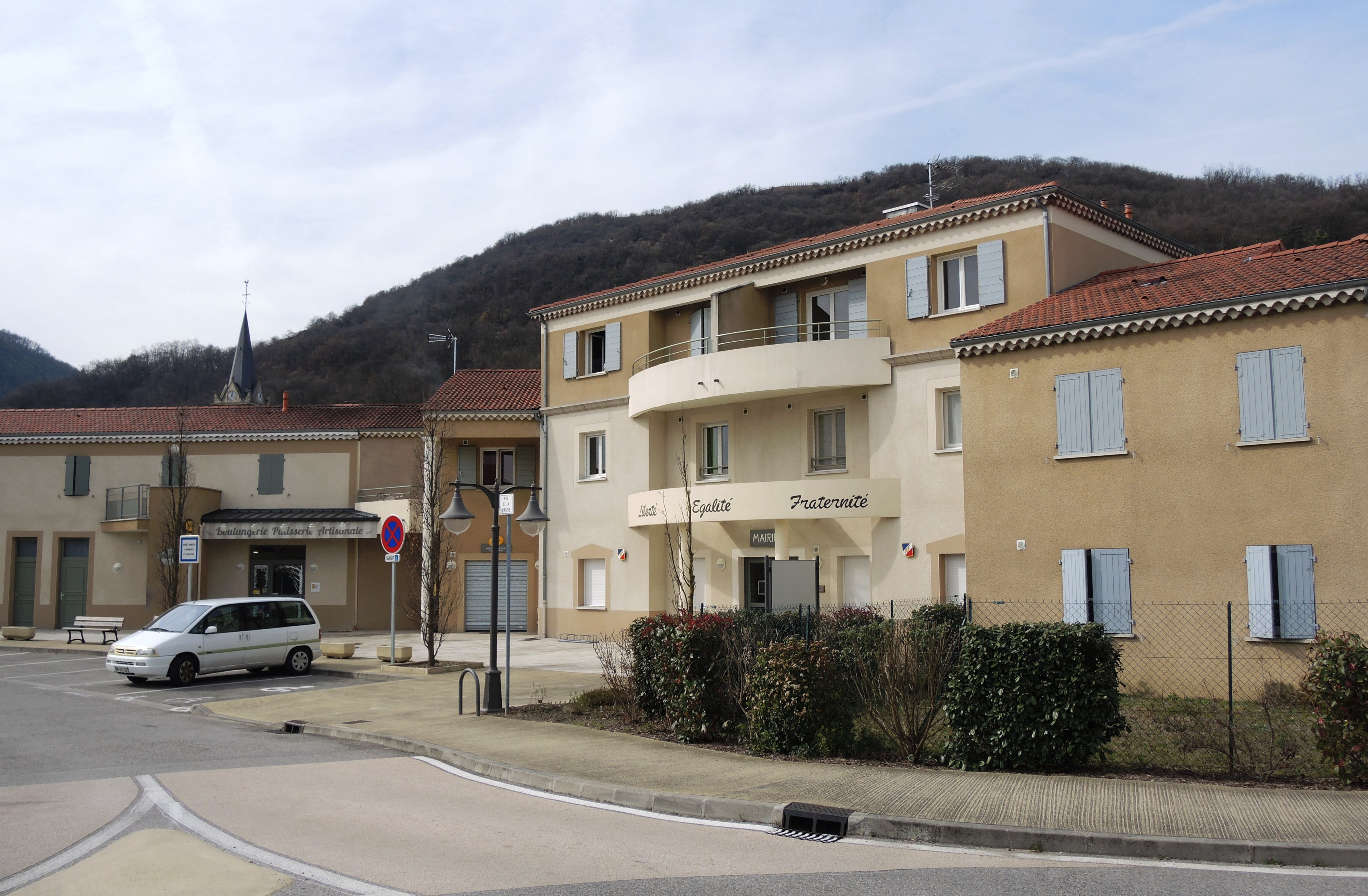 Peyraud détail